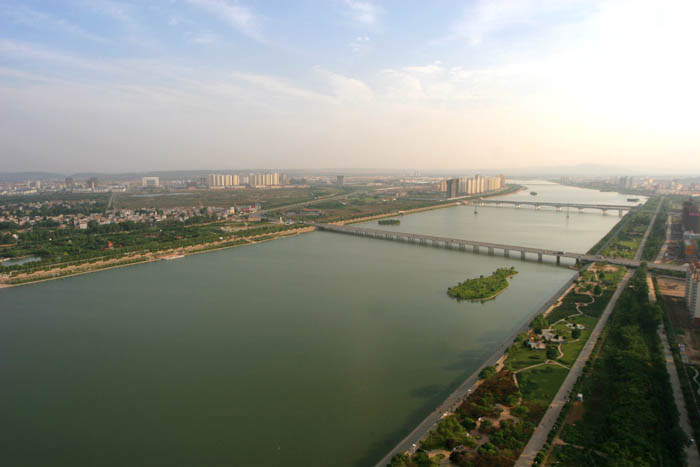 洛浦公园